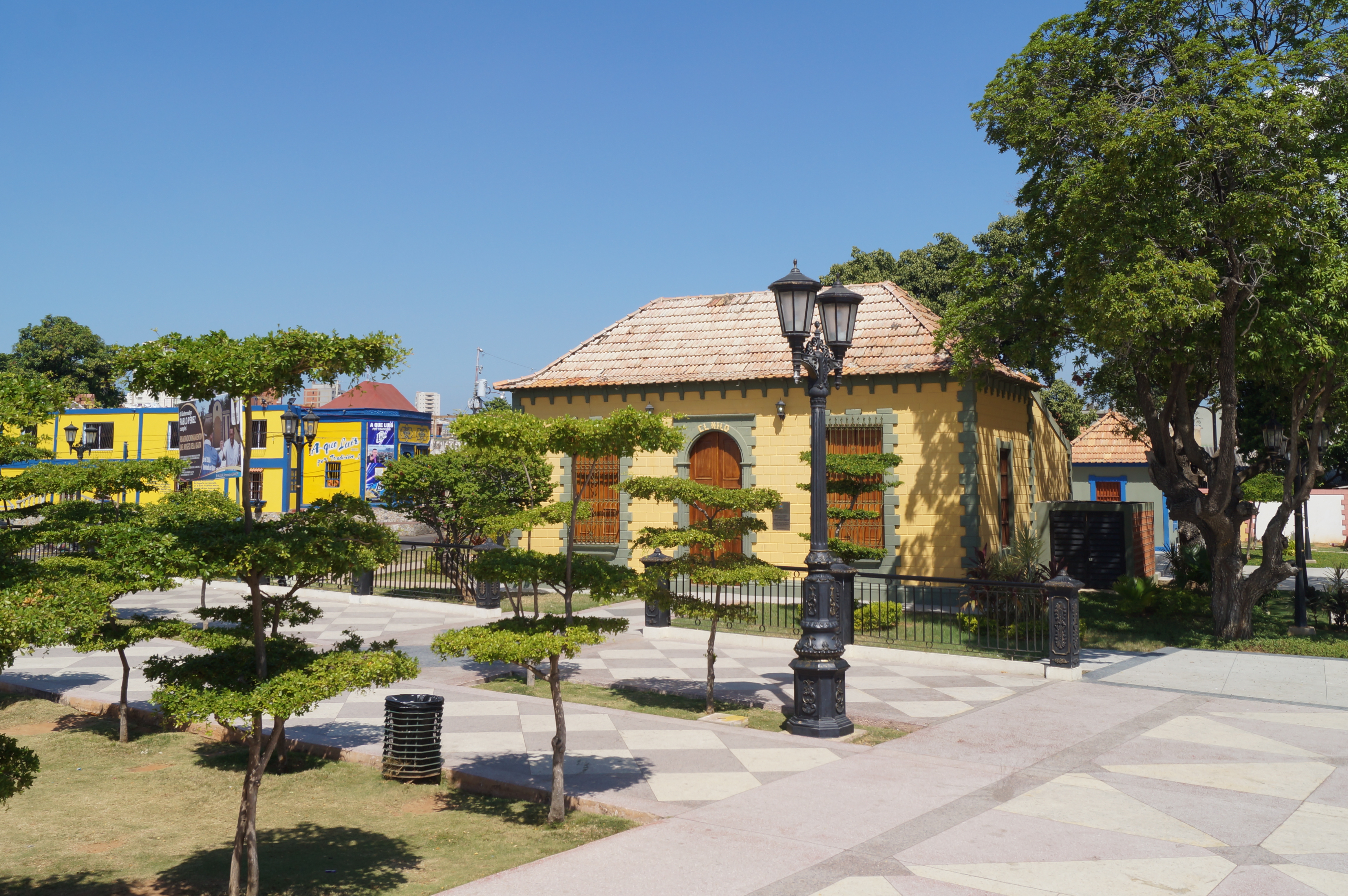 Museo de la Gaita “Humberto Mamaota Rodríguez”. Dentro del Museo de la Gaita hay una gran gama de artistas, gaiteros, cantantes, compositores. Esta ubicado en el sector Santa Lucía, tiene salas de exposiciones y áreas audiovisuales, en una extensión que alcanza 145 metros cuadrados. El museo representa la gaita como una expresión cultural y de la música de nuestra región. Maracaibo. Venezuela.